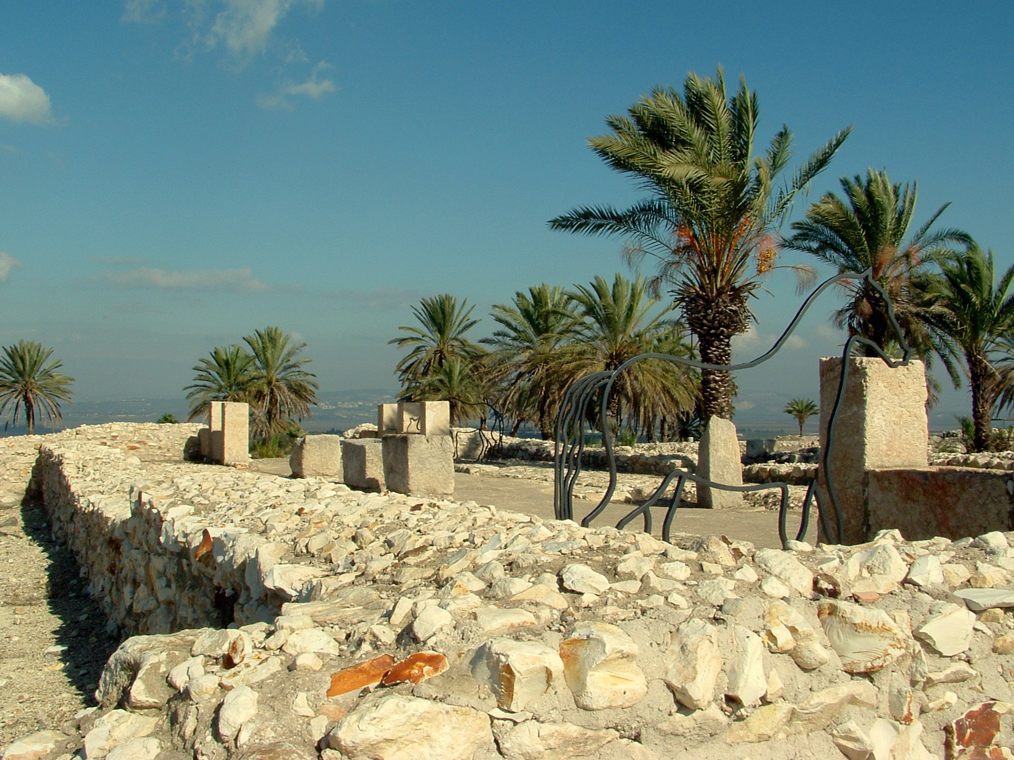 Megiddo preservation 2009 שימור מגידו 2009